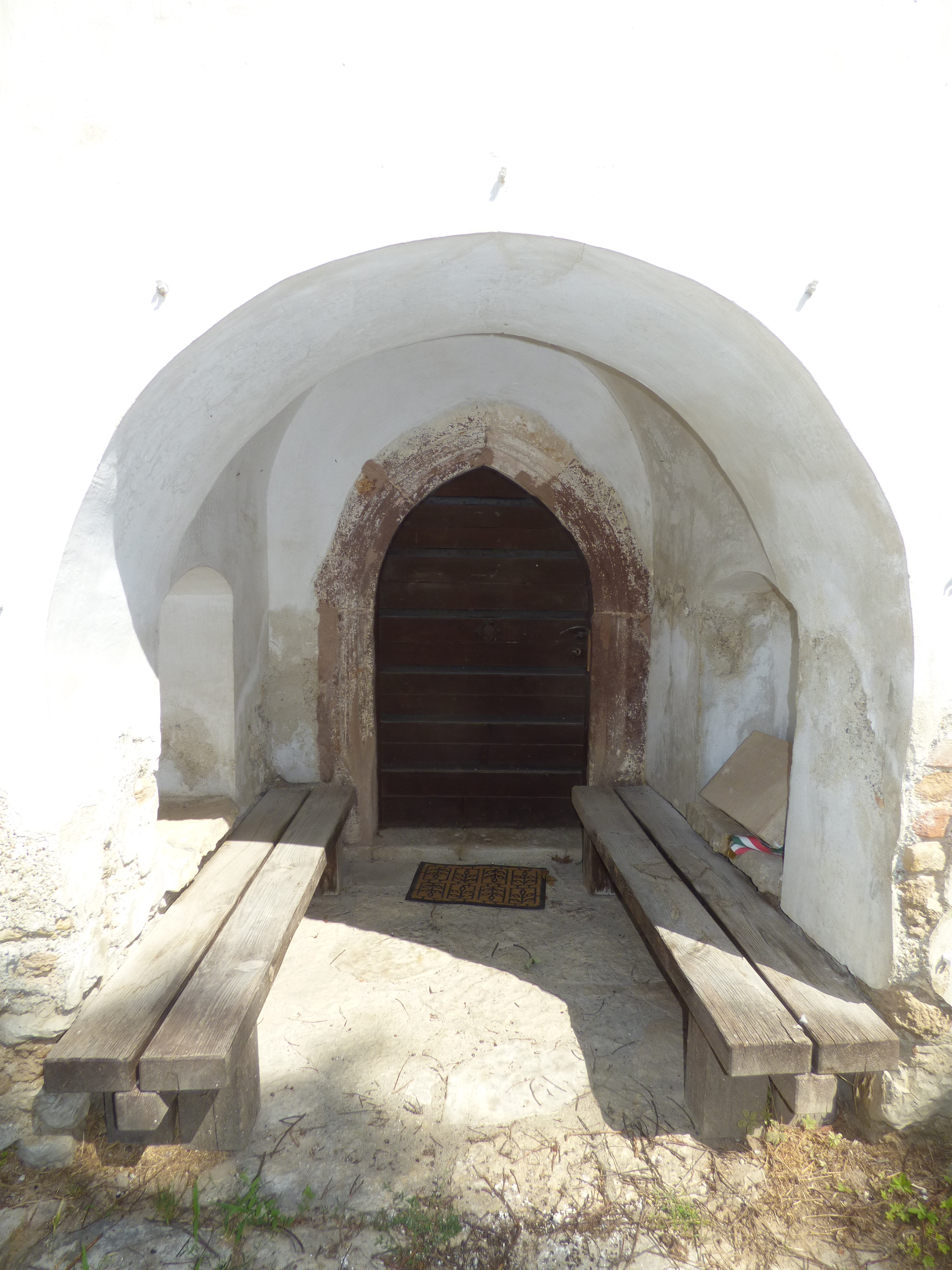 Balatonszőlős, a református templom bejárata